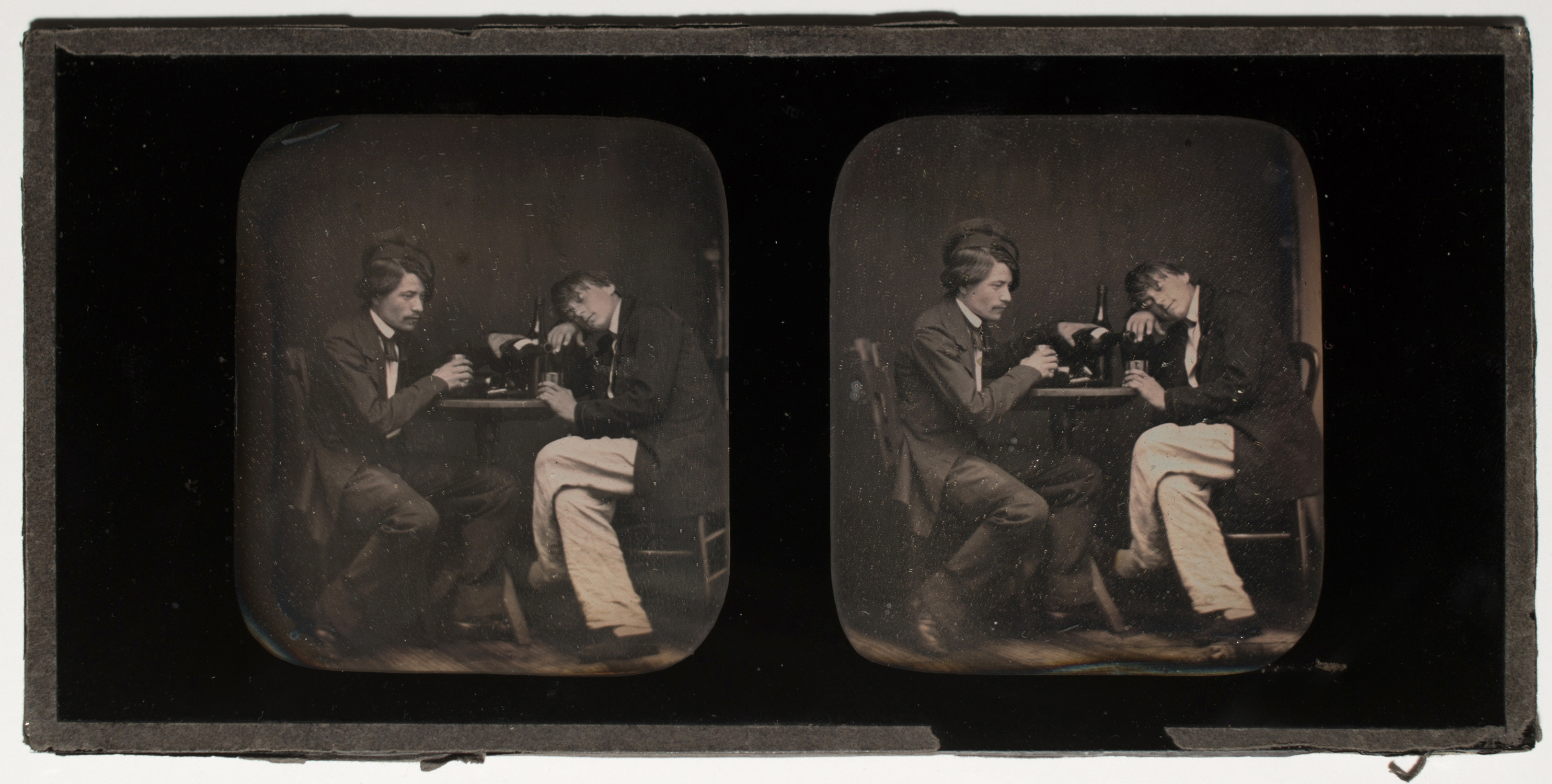 Stereodagerrotüüp Tartu Ülikooli Raamatukogu fotokogus. Lavastatud joomastseen. Daguerreobase:F-169_s-5